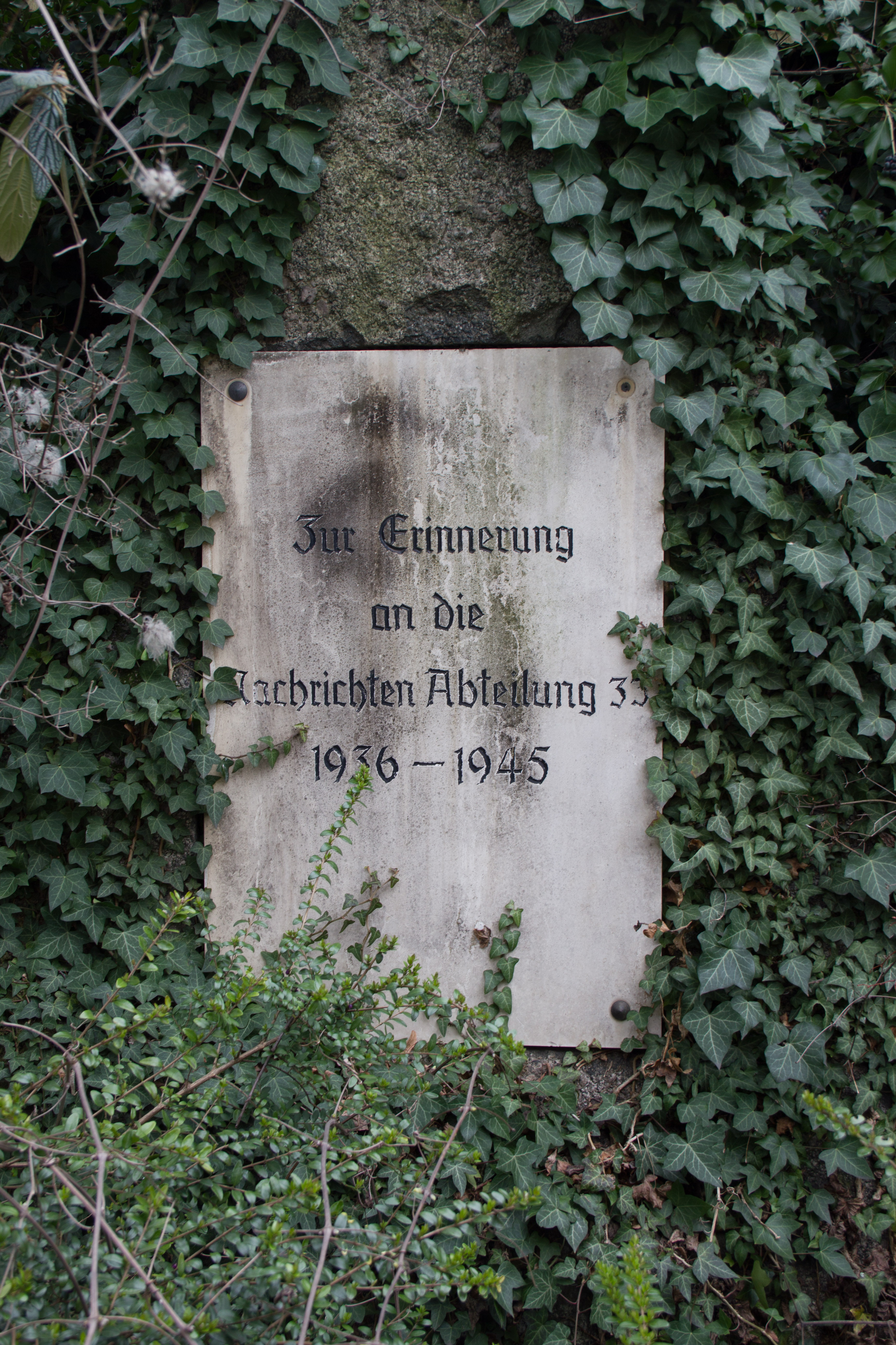 Gedenkstein: „Zur Erinnerung an die Nachrichten-Abteilung 33. 1936–1945“. Links vor der dem Tor, nach 1945 aufgestellt.